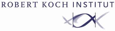 Logo des Robert Koch-Instituts